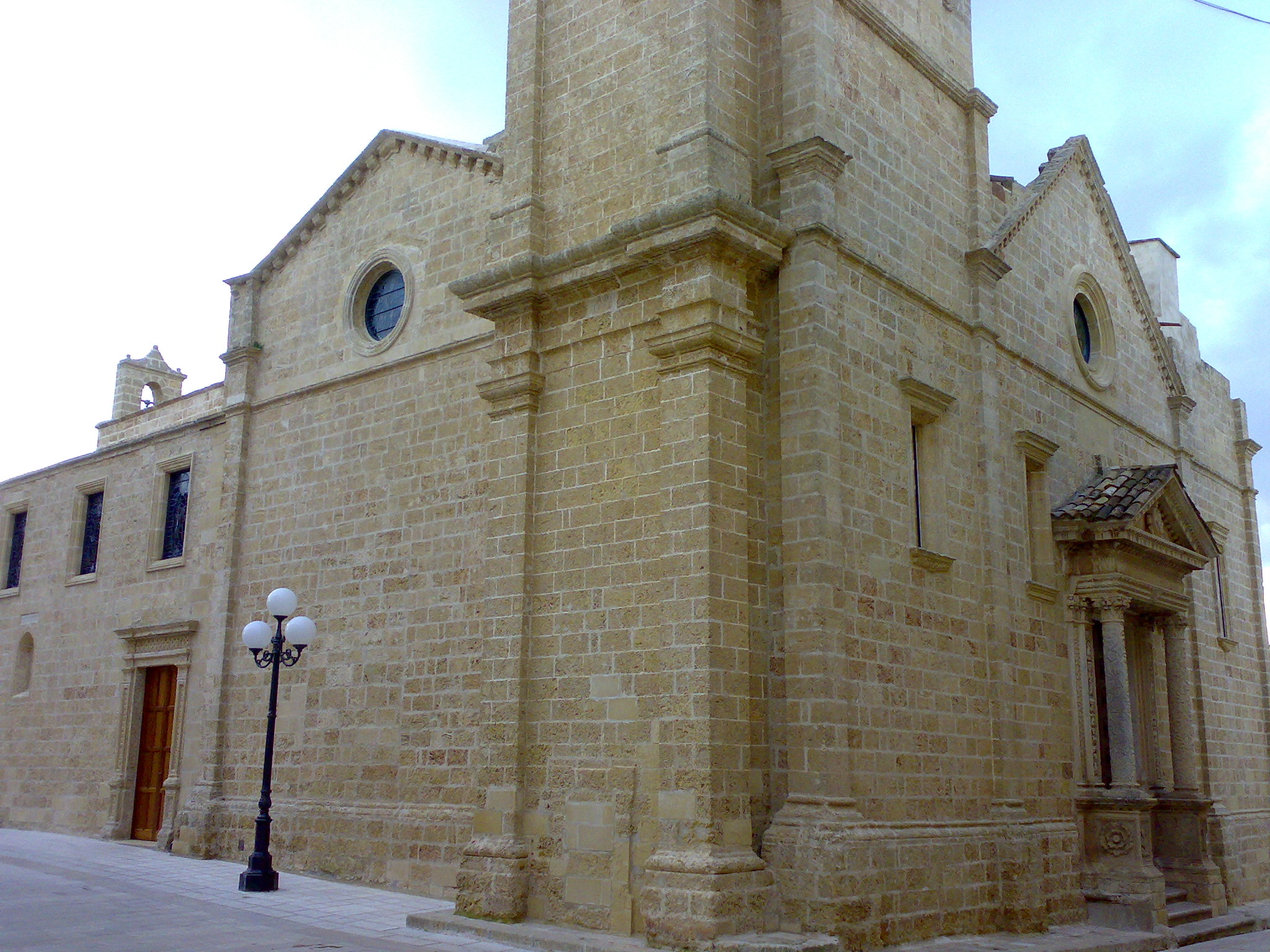 Chiesa madre Morciano di Leuca